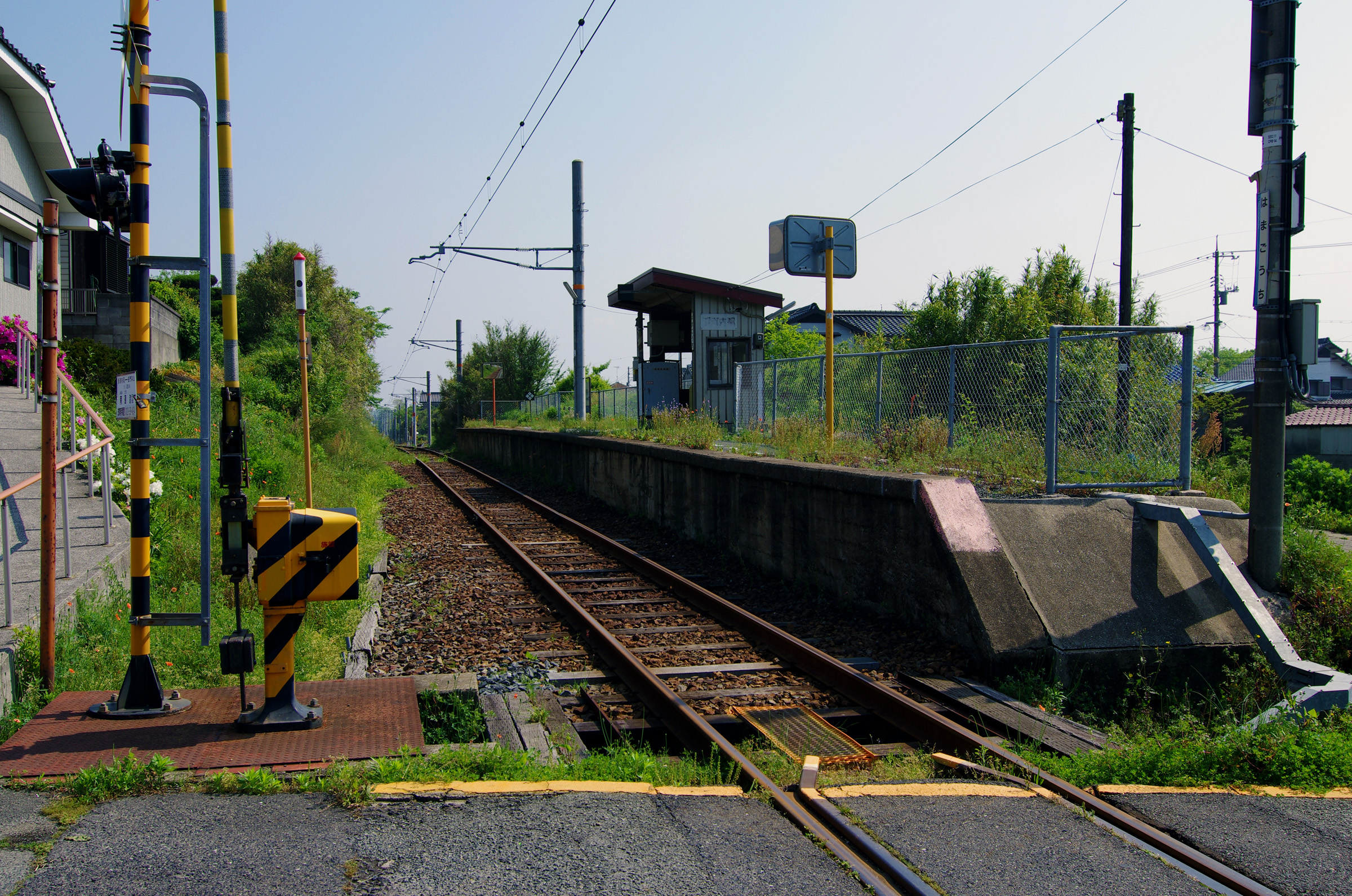 西日本旅客鉄塔小野田支線浜河内駅